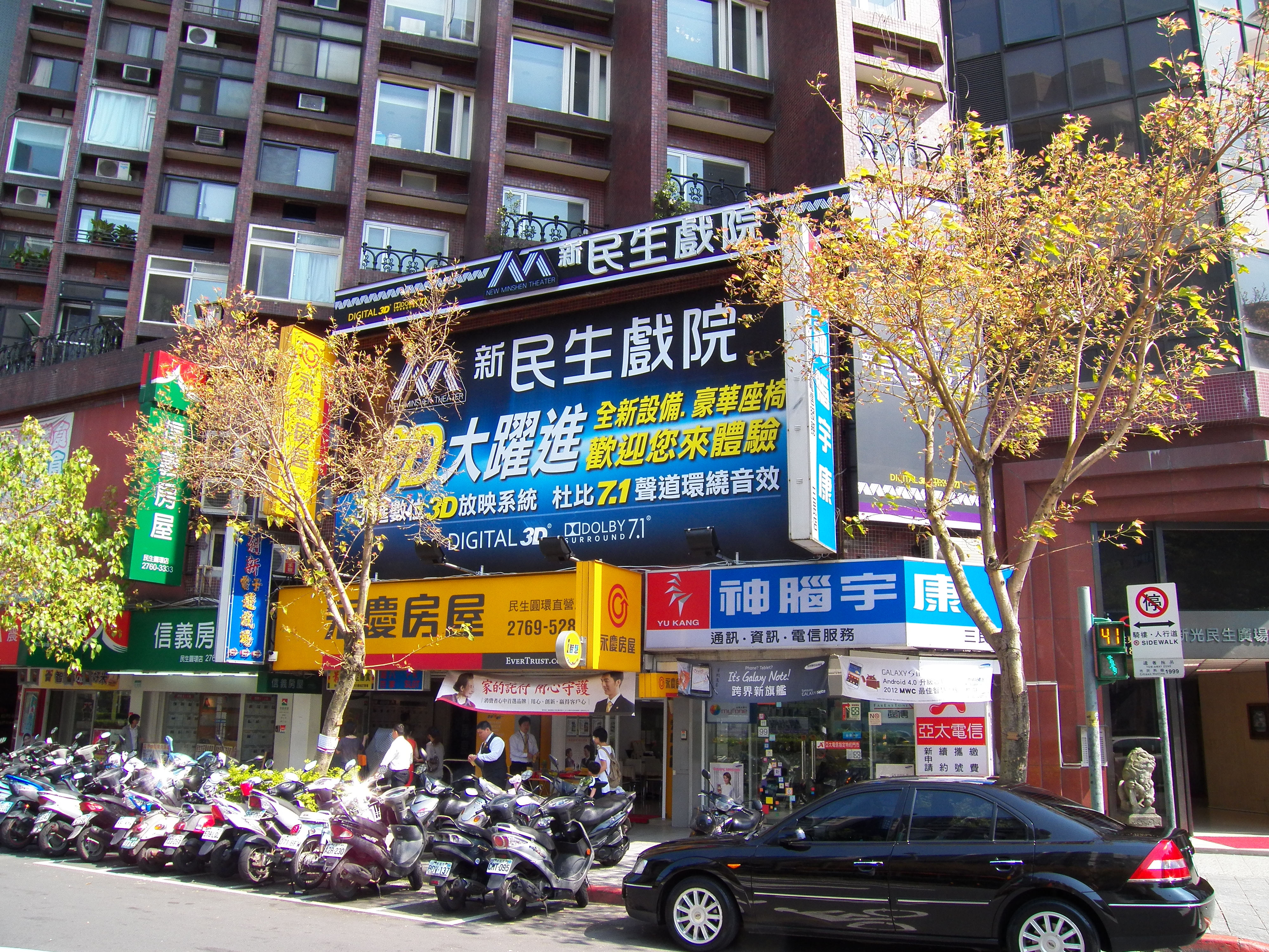 民生戲院休業15年後，由新業者接手，2012年4月24日重新開幕的新民生戲院。地址：臺北市松山區民生東路五段190號3樓。